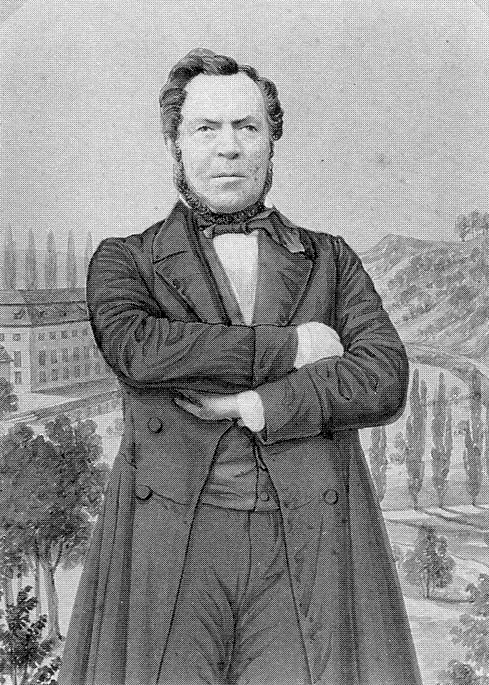 Andreas Quante (1799-1874), Abgeordneter der Paulskirche